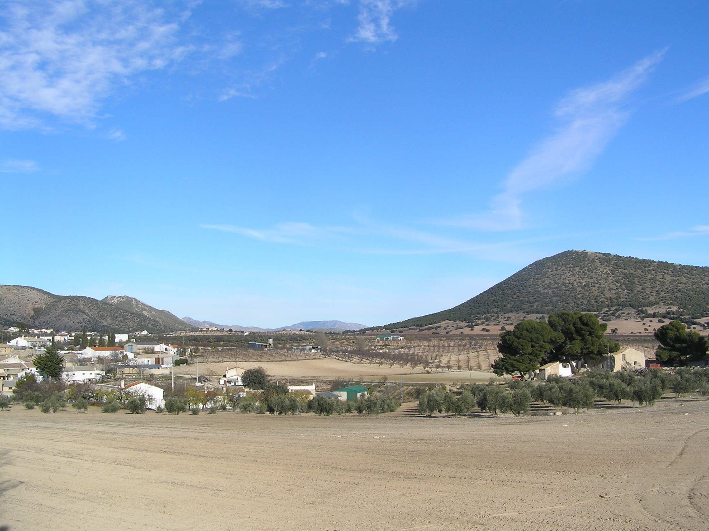 Fotografía contemporánea de Los Cortijillos.